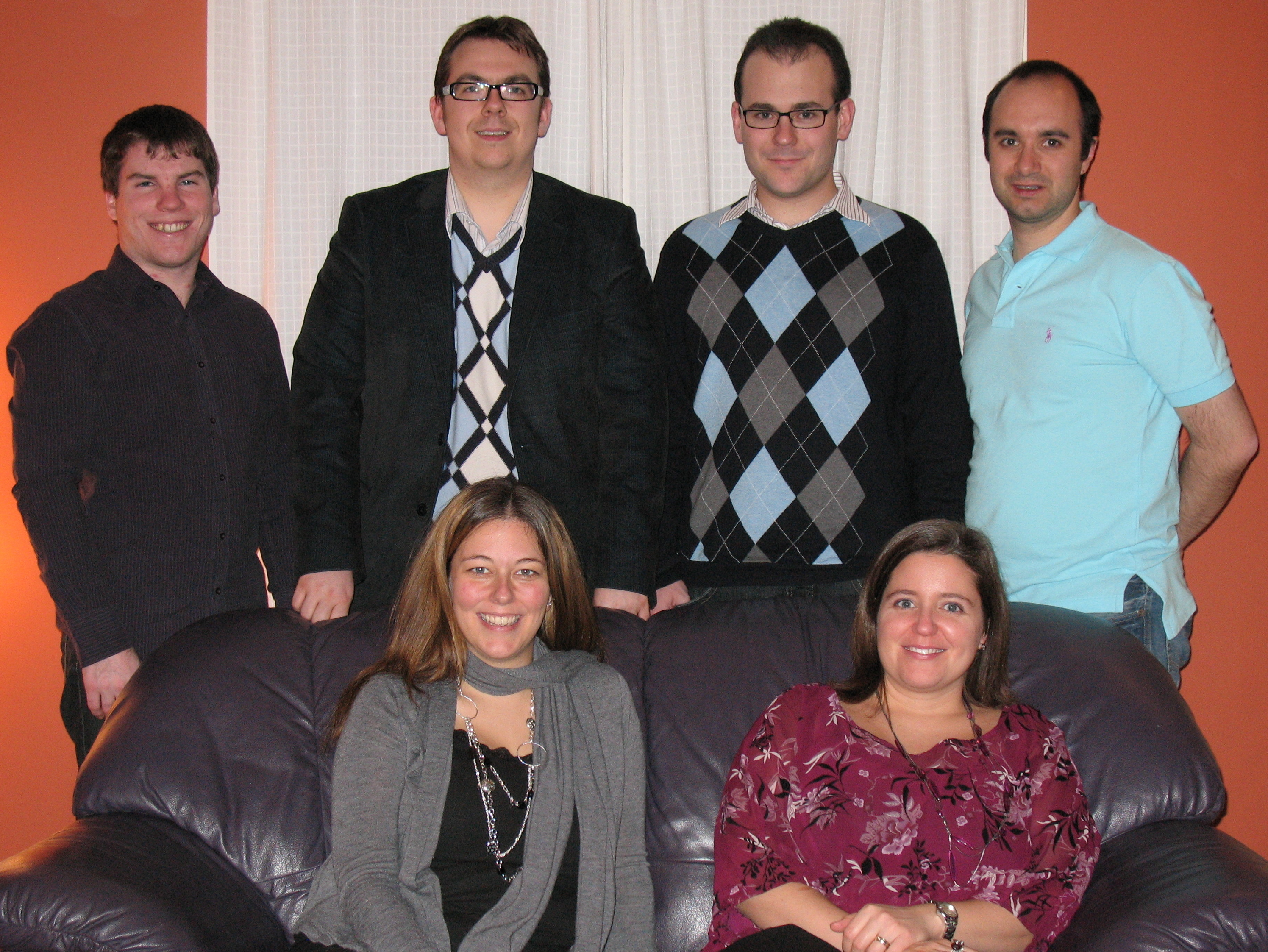 Anciens chefs du Caucus des Rouges du Parlement étudiant du Québec. Première rangée: Kim Lagueux-Dugal (23e), Jacinthe Turmel (21e). Deuxième rangée: Maxime Gauthier (24e), Jean-Nicolas Marchand (22e), Julien Morissette (20e), Vincent Robidas (19e).